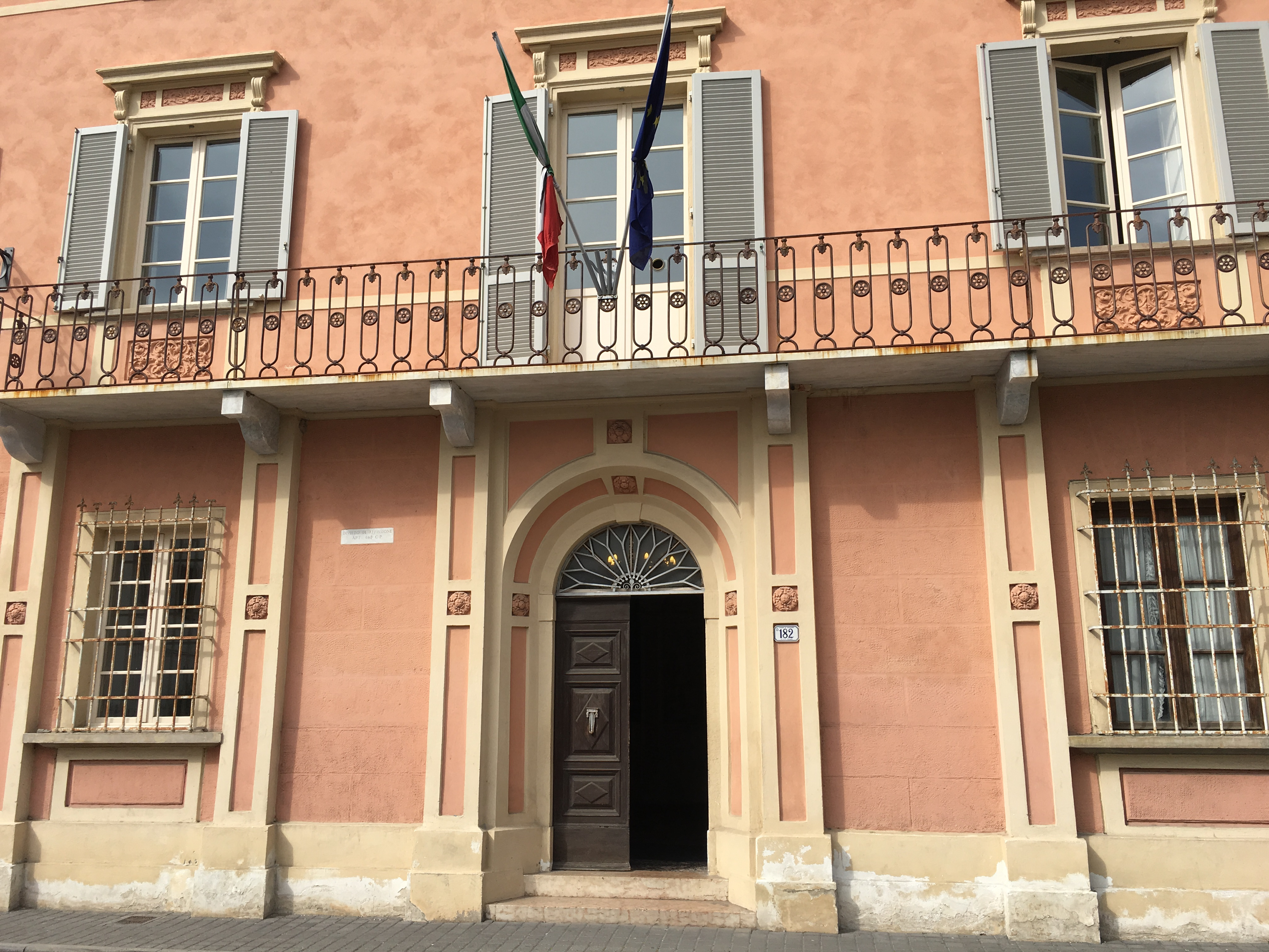 Palazzo Comunale di Vecchiano